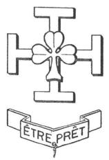 Première Croix de Promesse des Scouts de France